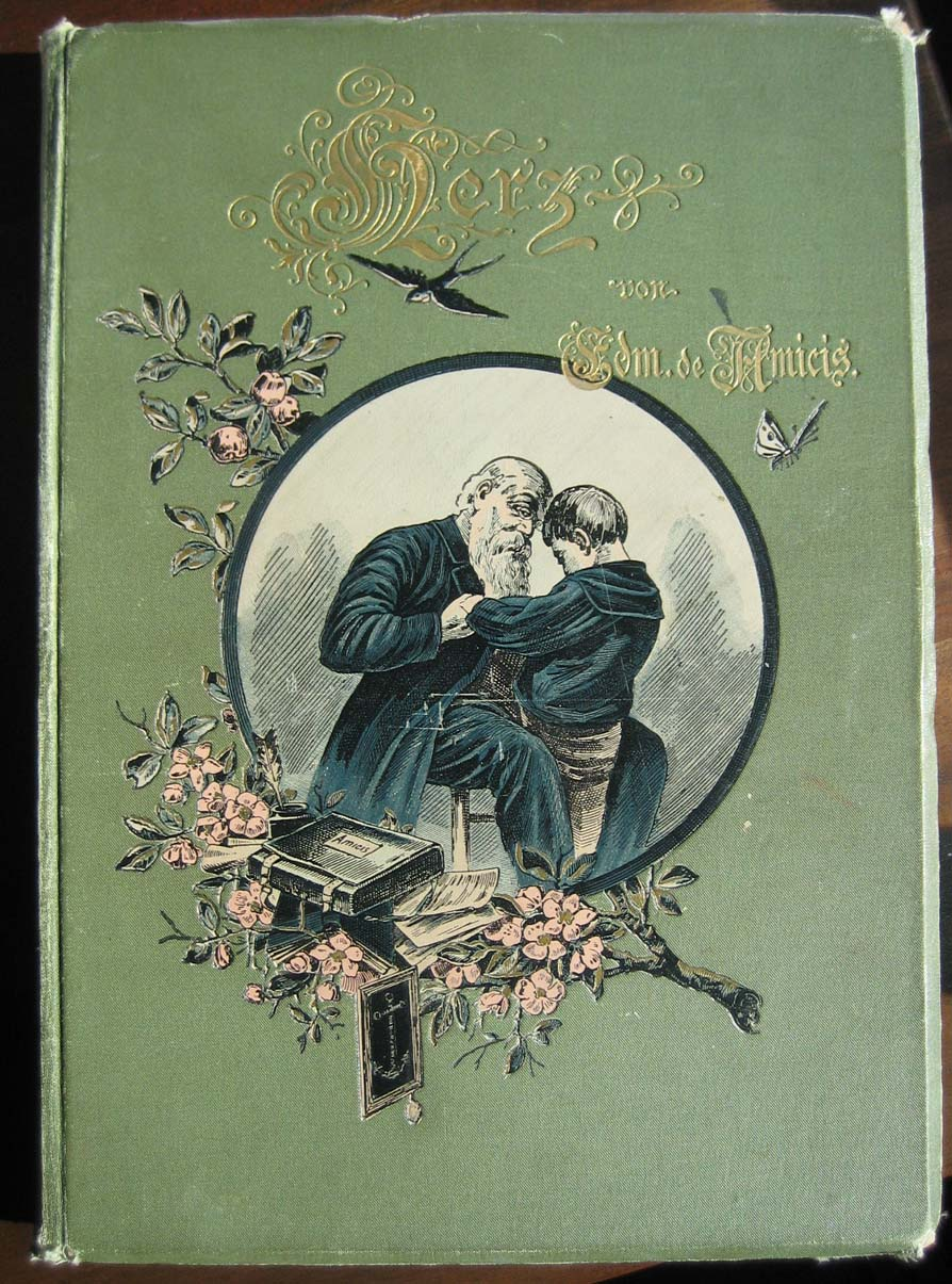 Titelbild von 'Herz' aus dem Jahr 1894